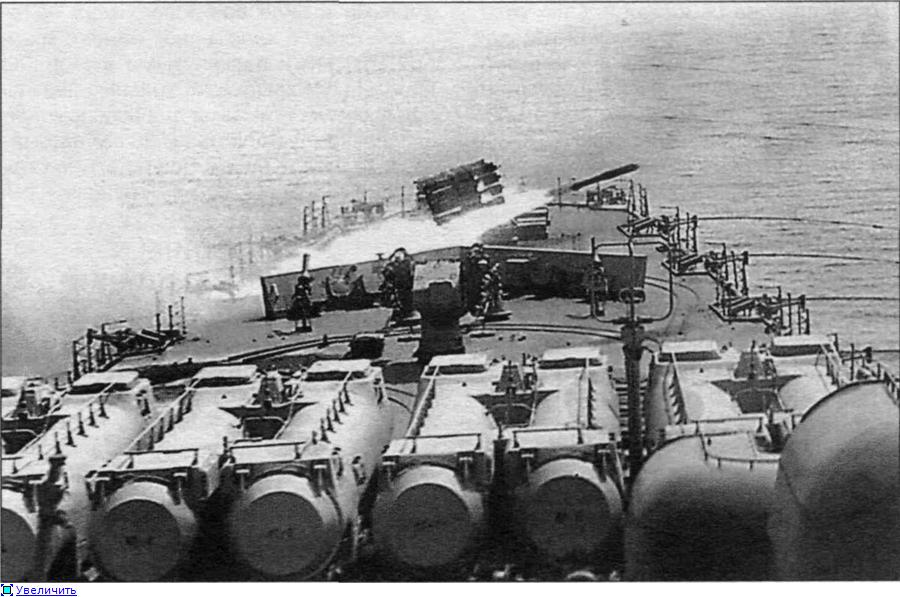 Стрельба из РБУ-12000 ("Удав") во время испытаний ТАКР "Баку", 1987 год